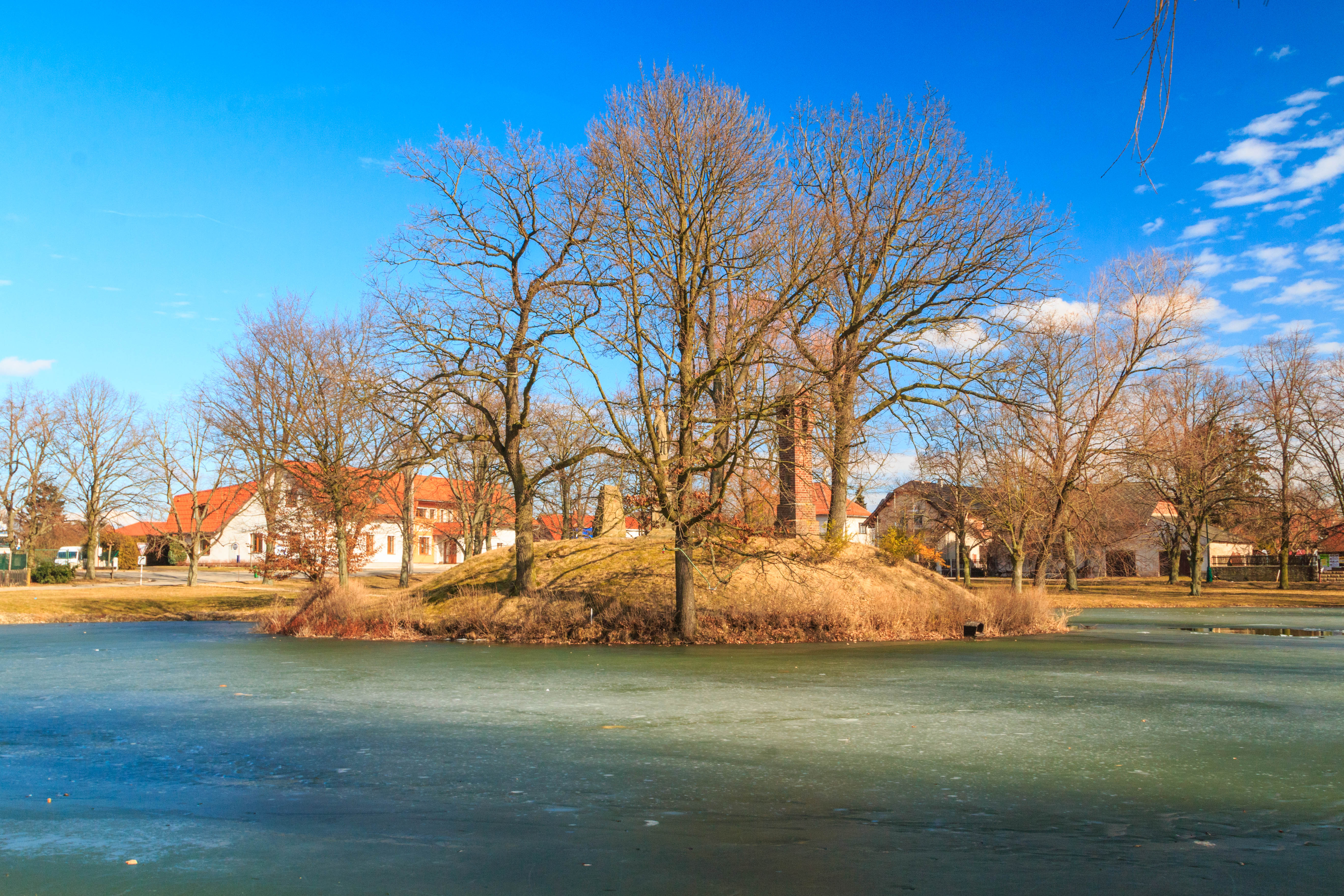 Návesní rybník v Obědovicích Project: Vodstvo